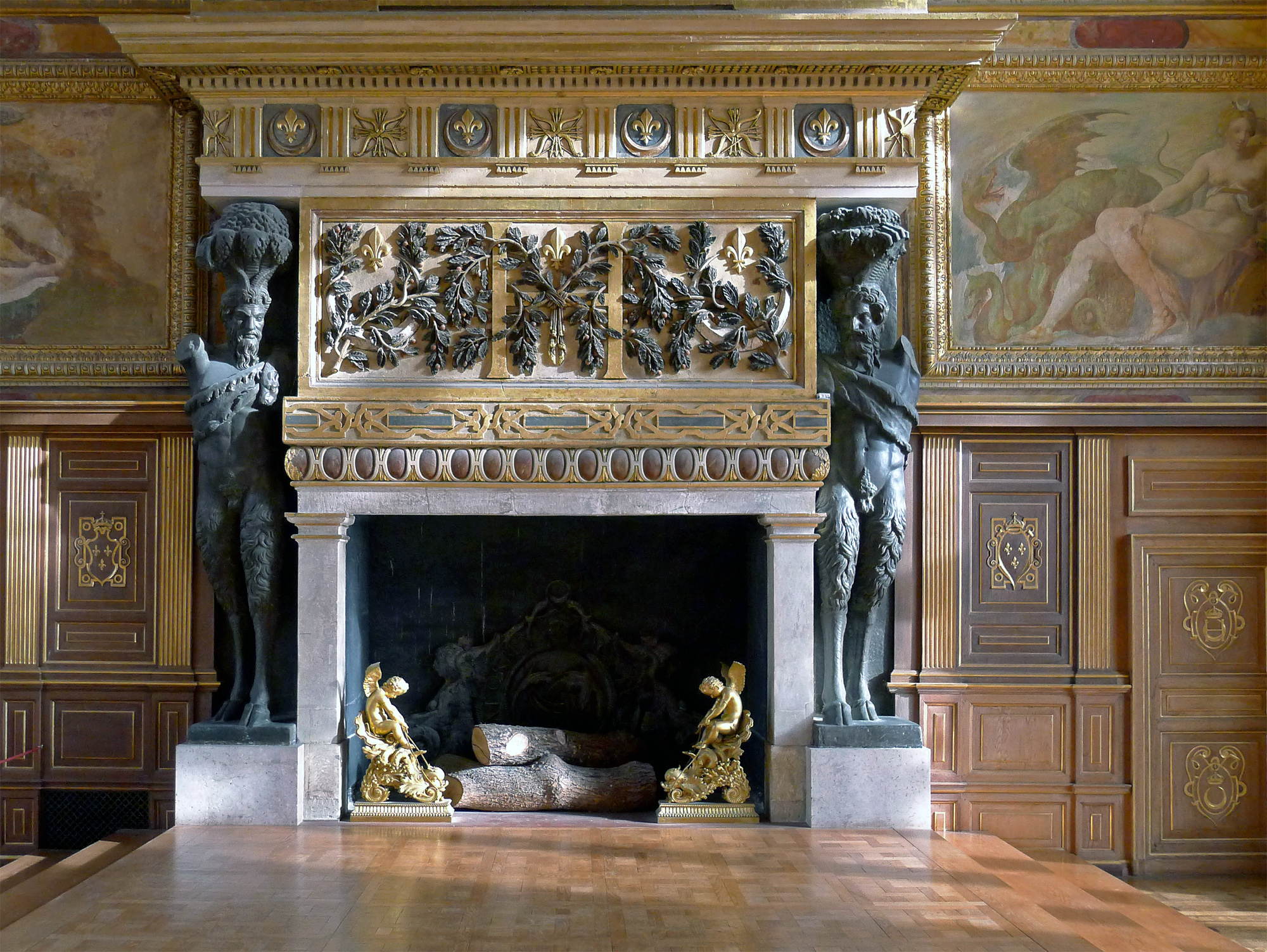 Château de Fontainebleau .